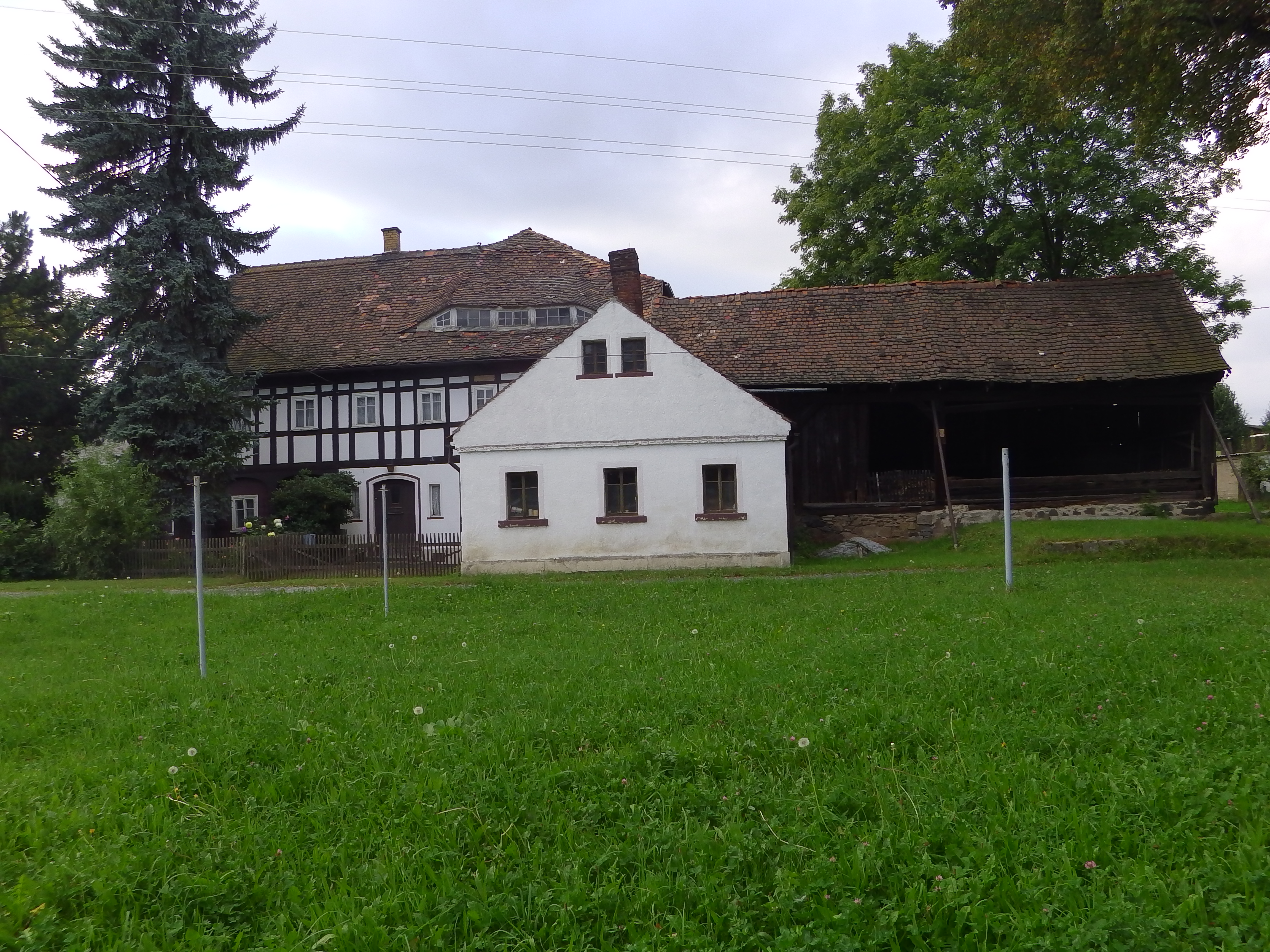 ehemalige Mühle mit Wohnhaus (Umgebinde), Finkenhübelstraße 4